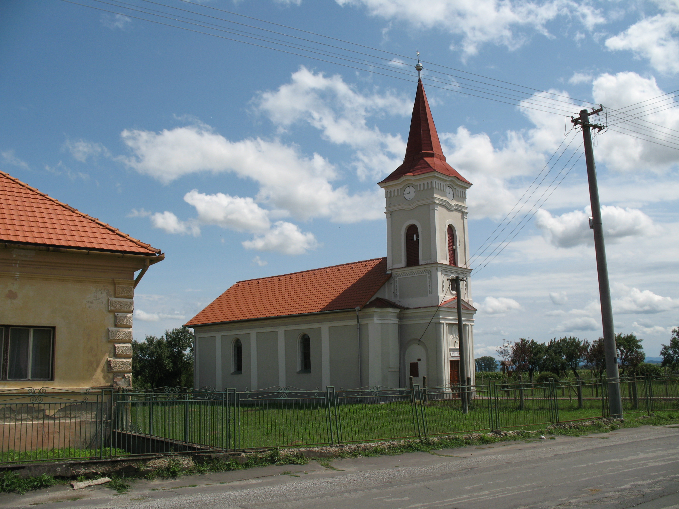 Bátka